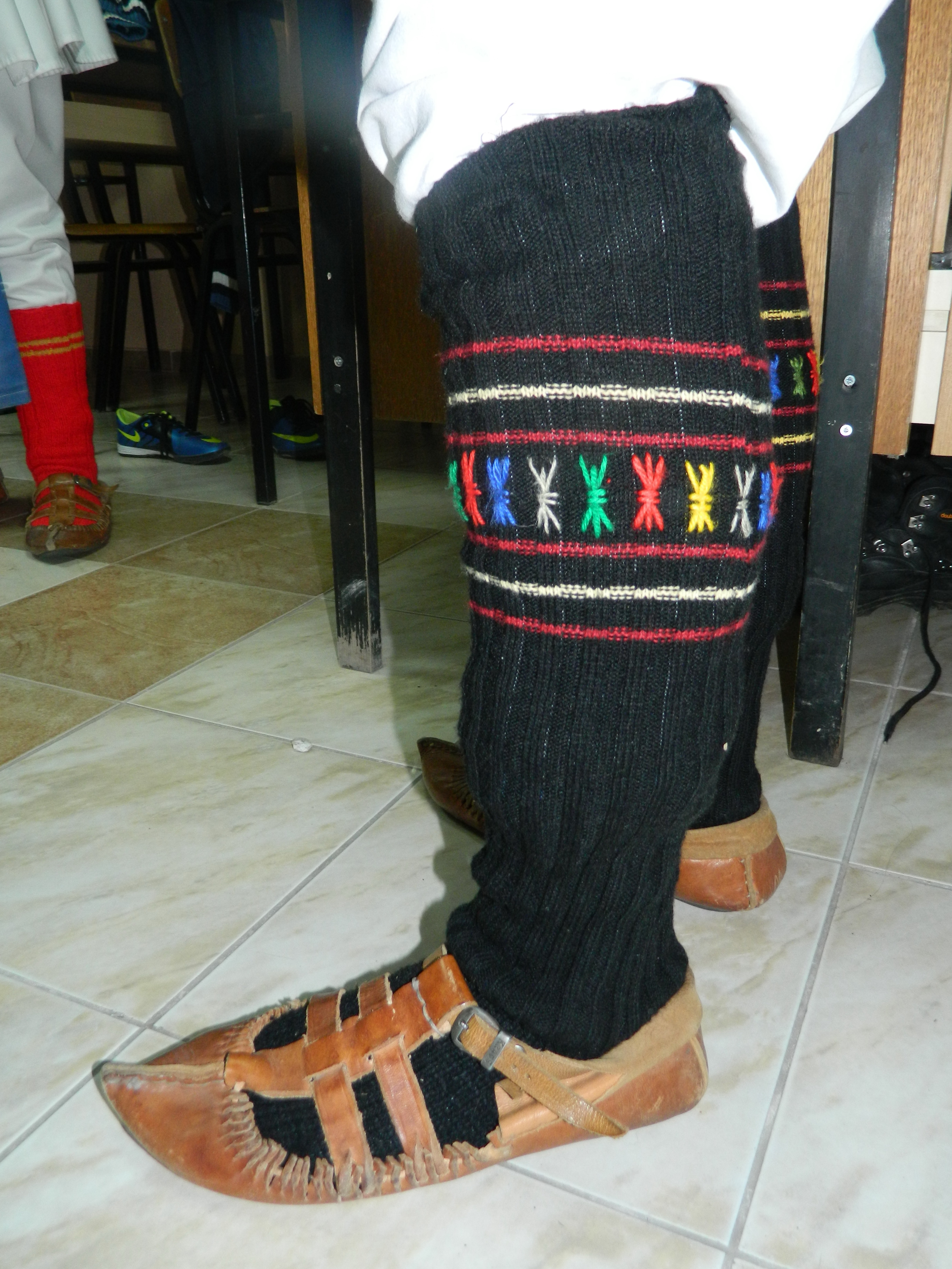 Народна носија - Опинци и чорапи.